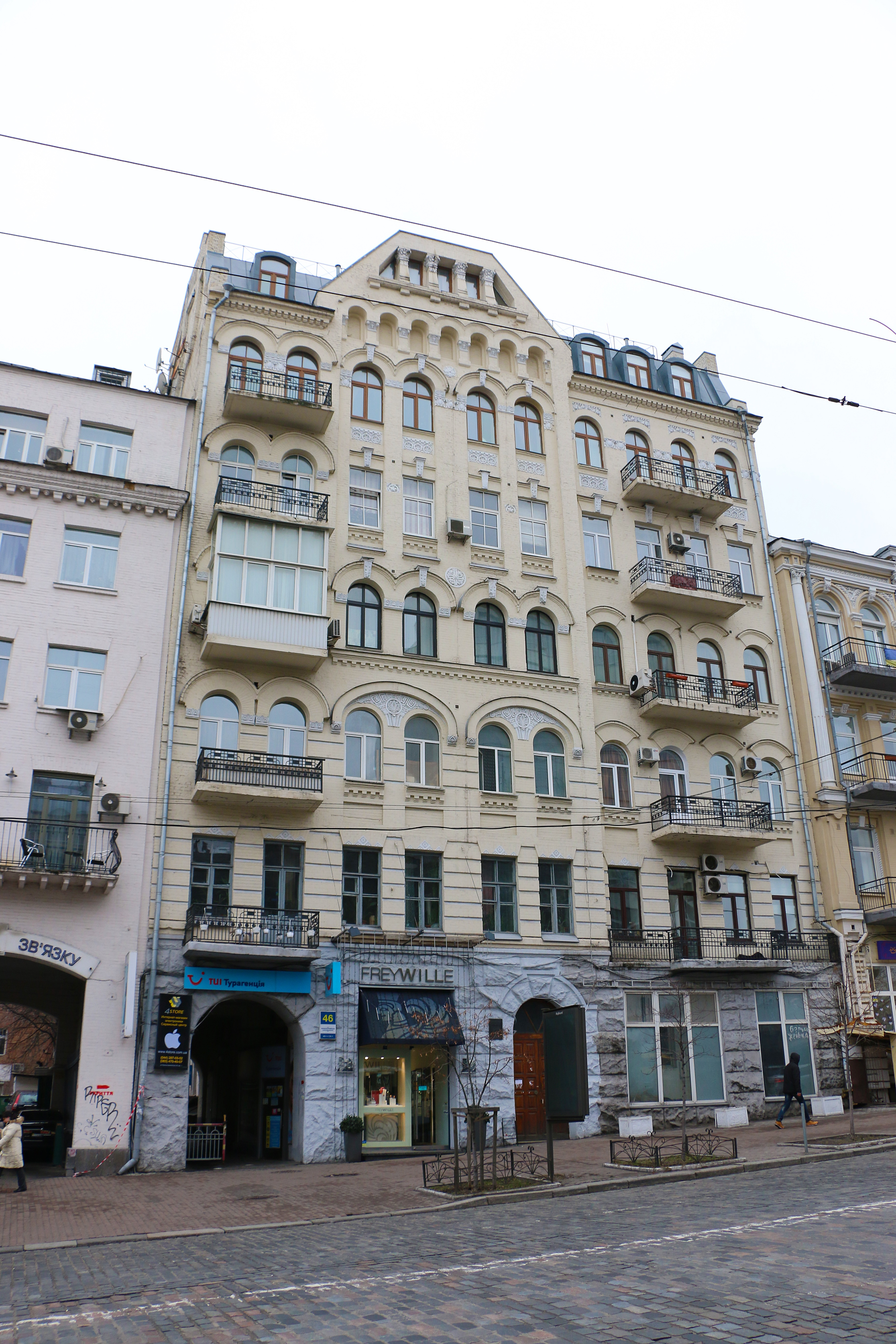 Будинок прибутковий, Київ, Велика Васильківська вул., 46